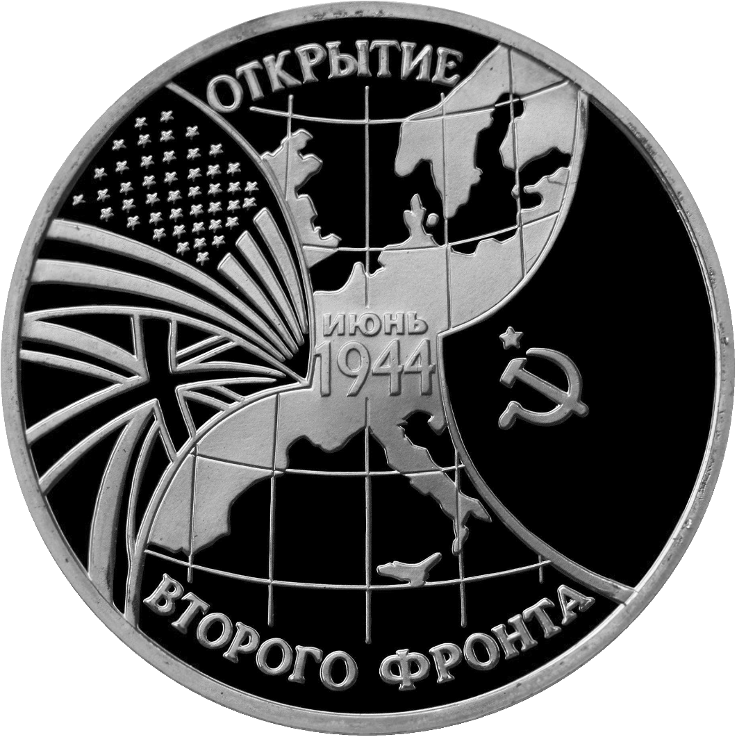 Монета Банка России — Серия: «Великая Отечественная война», 50-летие Победы в Великой Отечественной войне, Открытие второго фронта, 3 рубля, реверс.